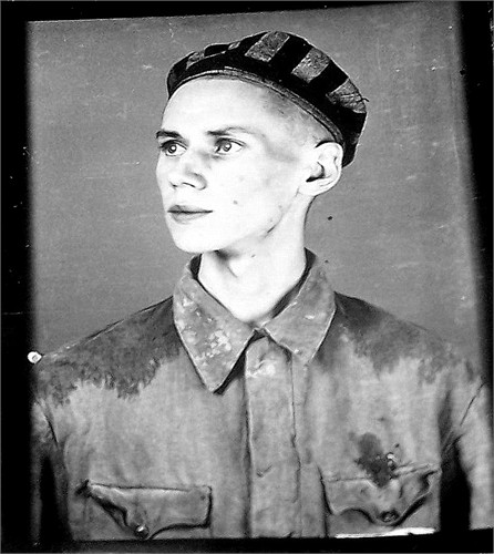 Stanisław Krzyżowski (1923–1942), bratanek Stanisława Krzyżowskiego (1893–1933)